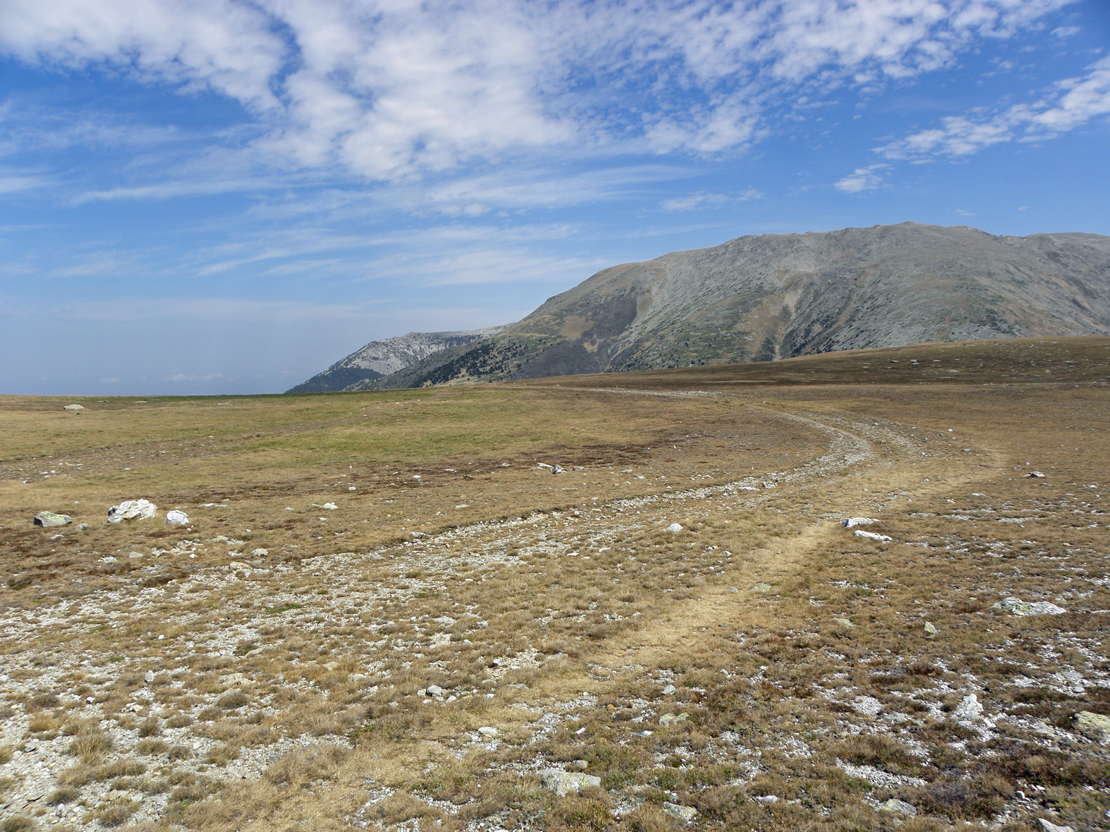 Pla Guillem